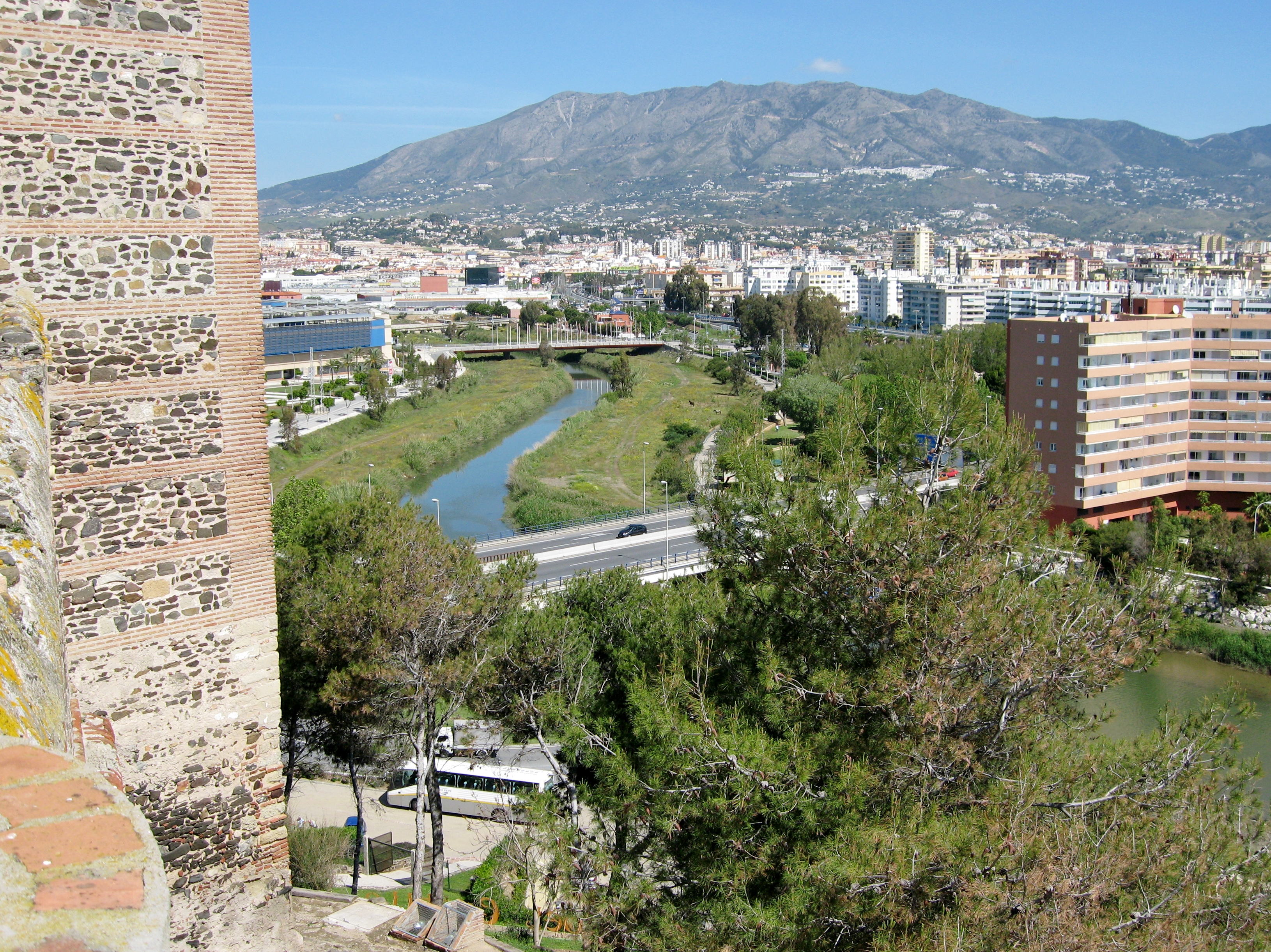 Río Fuengirola vom Castillo de Sohail, Fuengirola, Provinz Málaga, Andalusien, Spanien